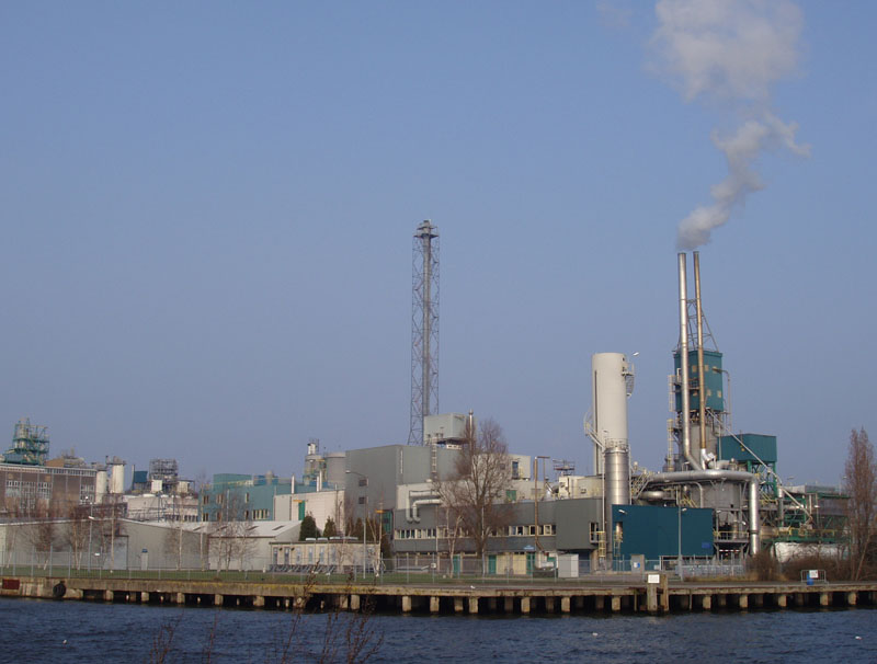 Chemische fabriek Albemarle in Amsterdam-Noord